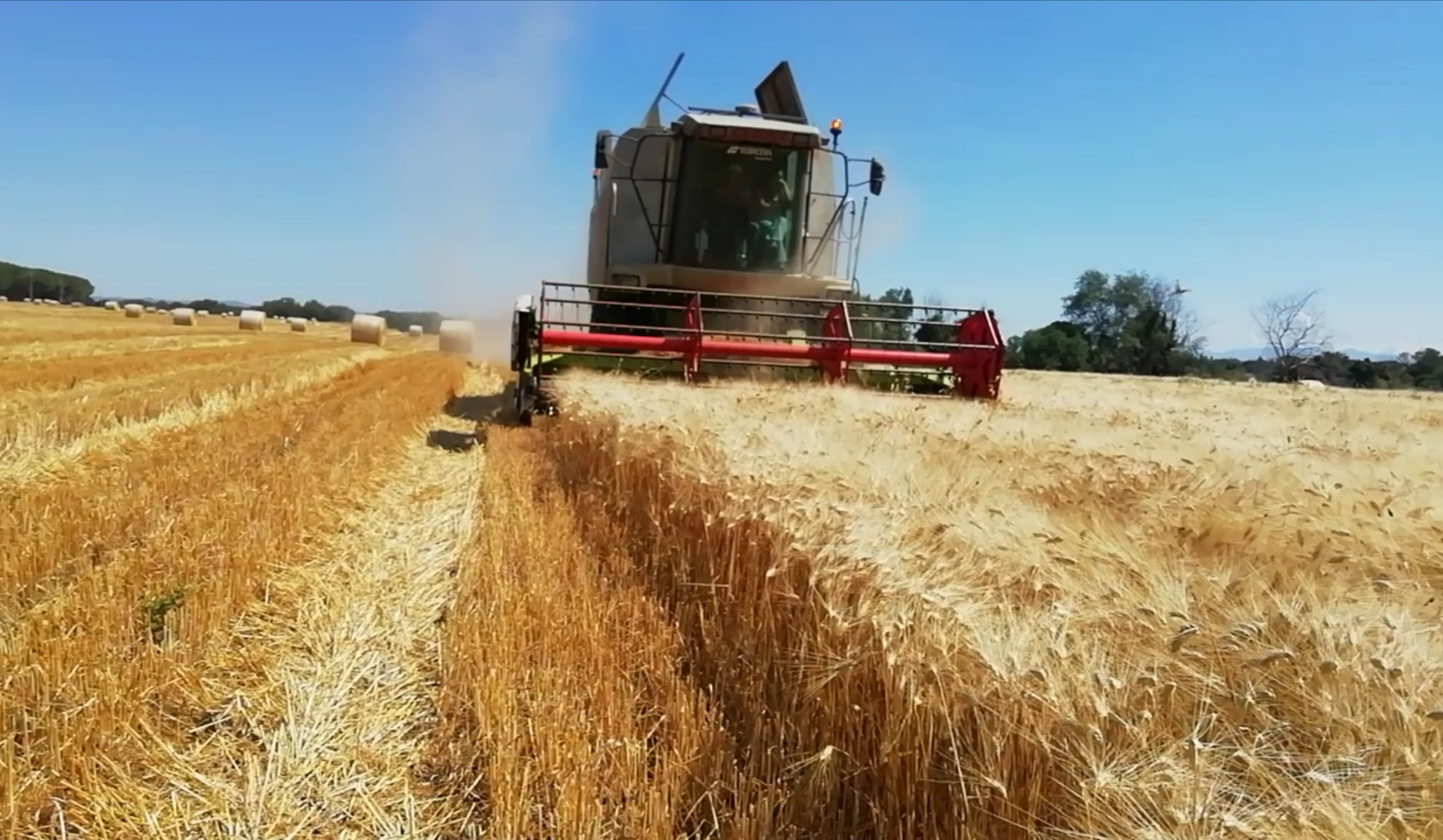 Esempio di come viene raccolti i cereali al giorno d'oggi